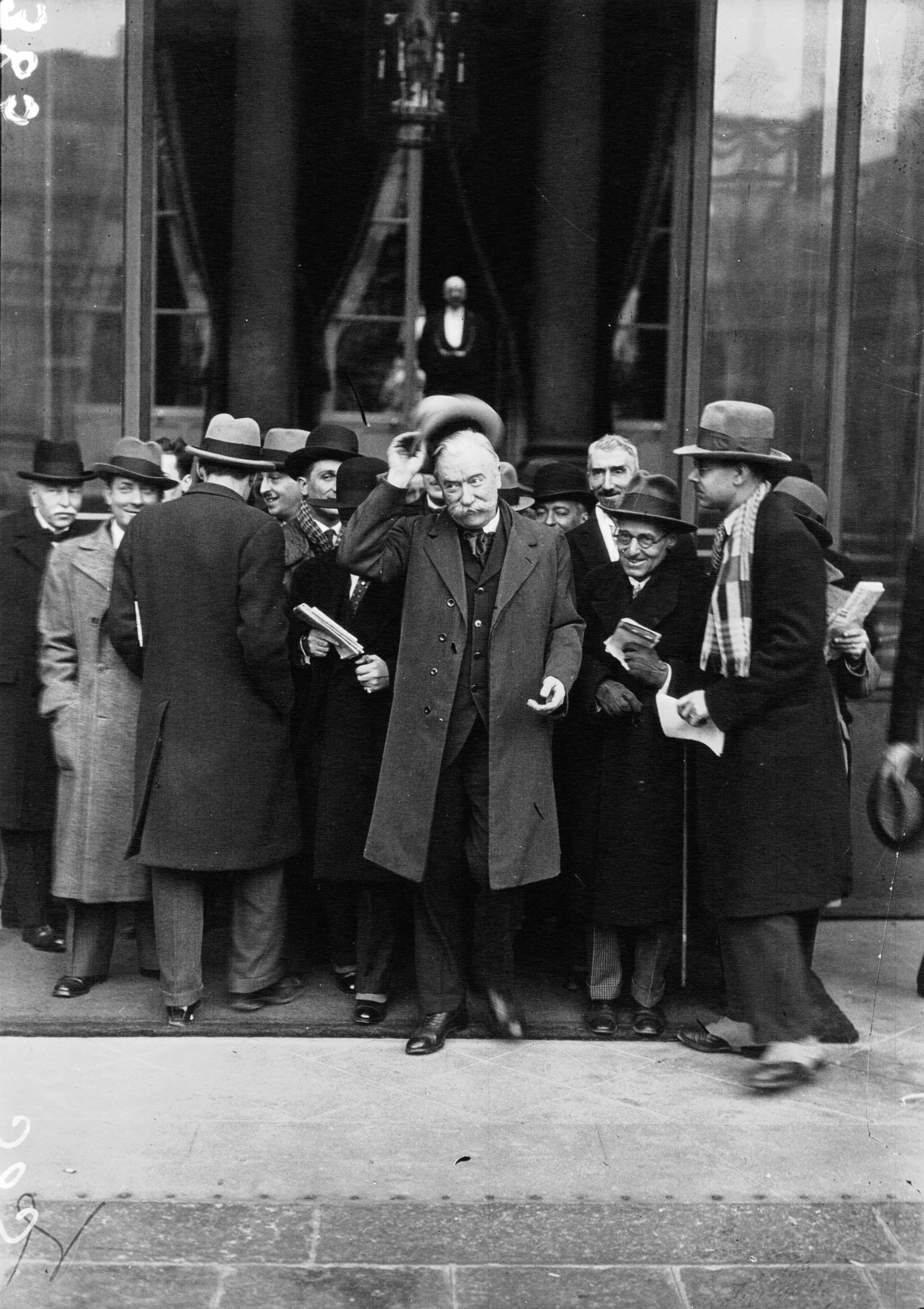 Louis Marin (homme politique) en 1932.